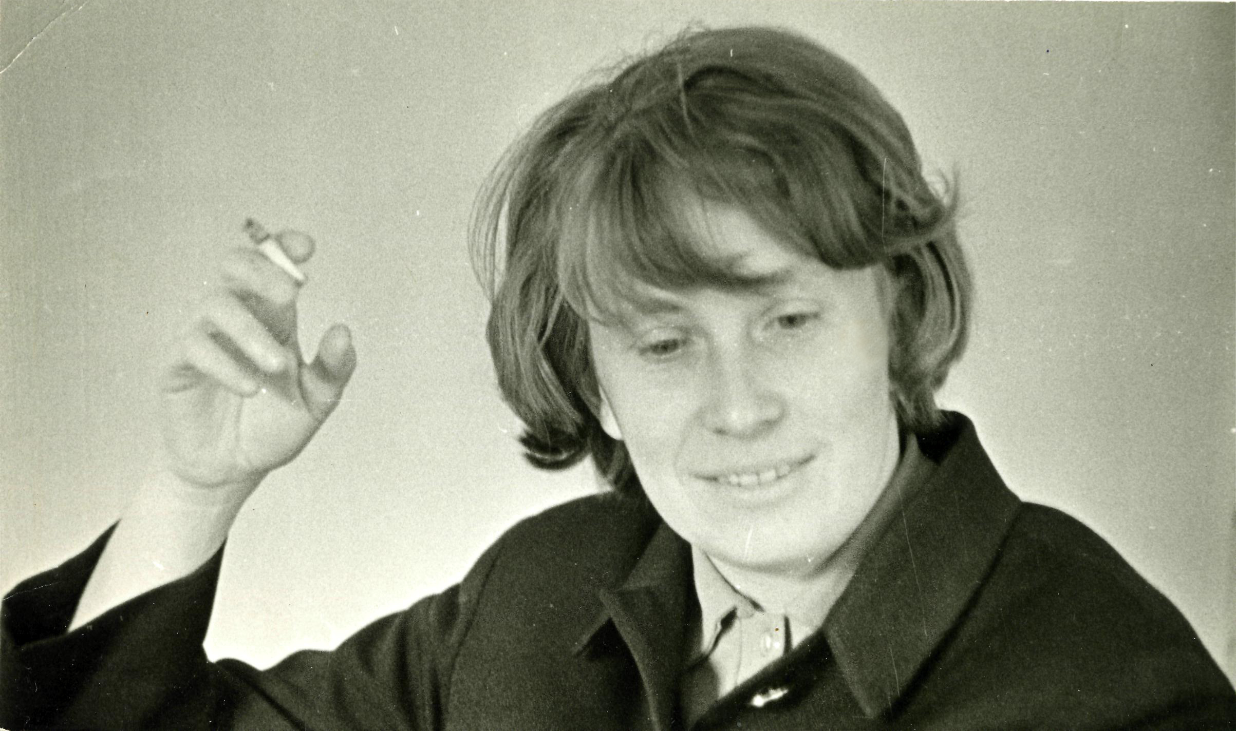 Надежда Николаевна Гашева, составитель и редактор Пермского книжного издательства. Фото для сборника «Княженика» (1968).